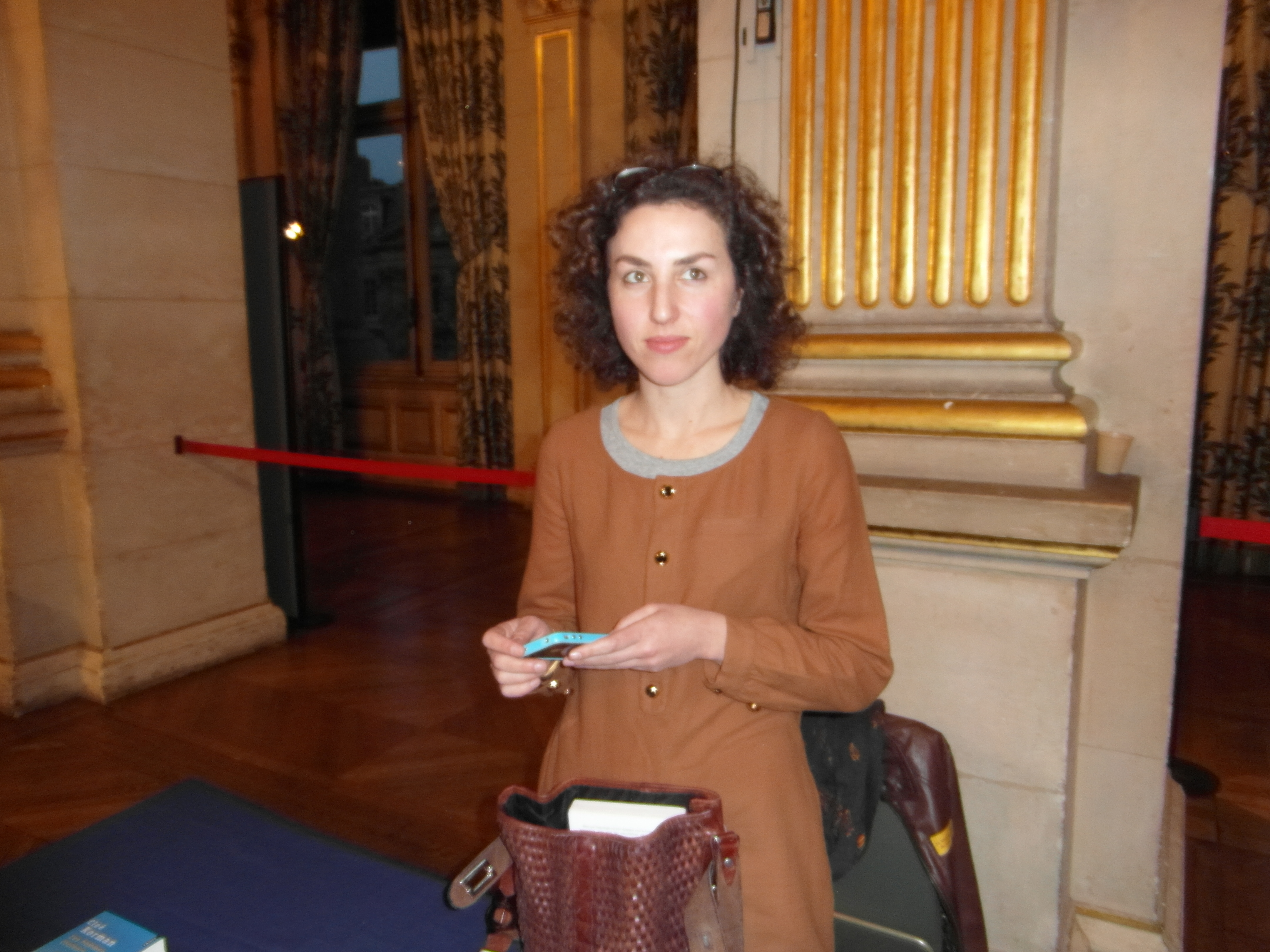 20e Maghreb des Livres, Paris, 8 février 2014